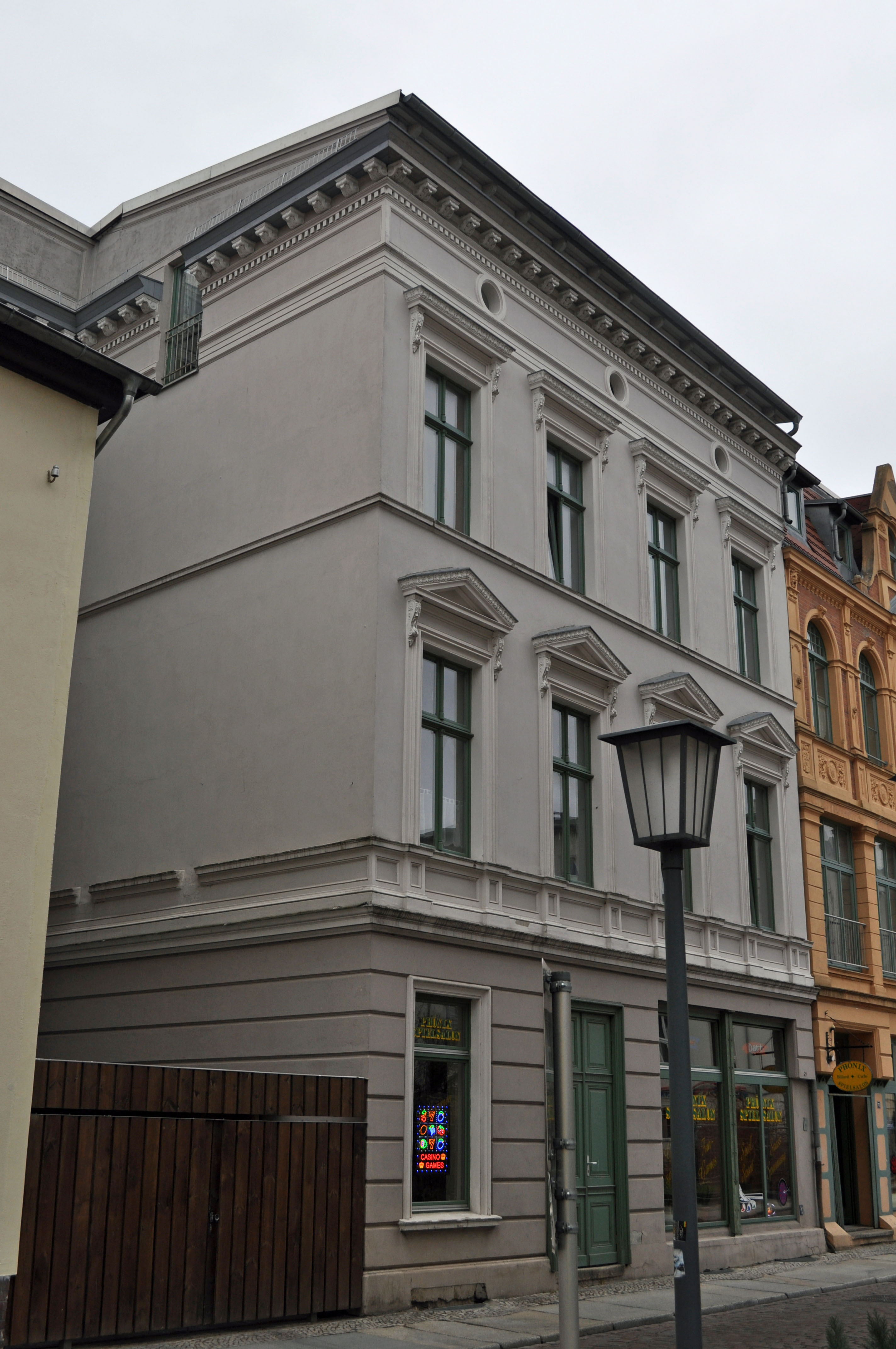 Gebäude bzw. Gebäudedetail in Stralsund. Straße und Hausnummer siehe Dateiname.